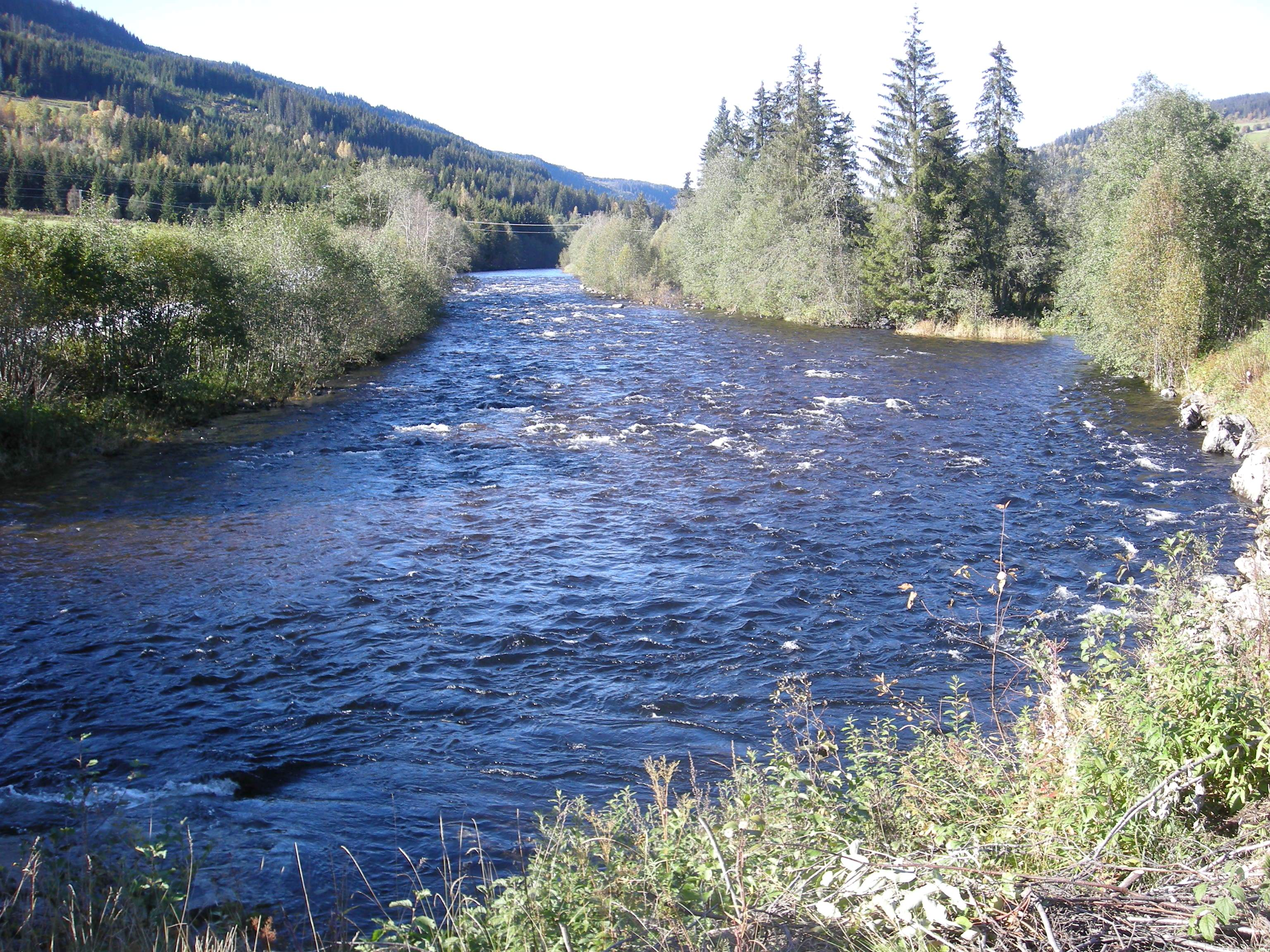 Elven Jøra i Vestre Gausdal